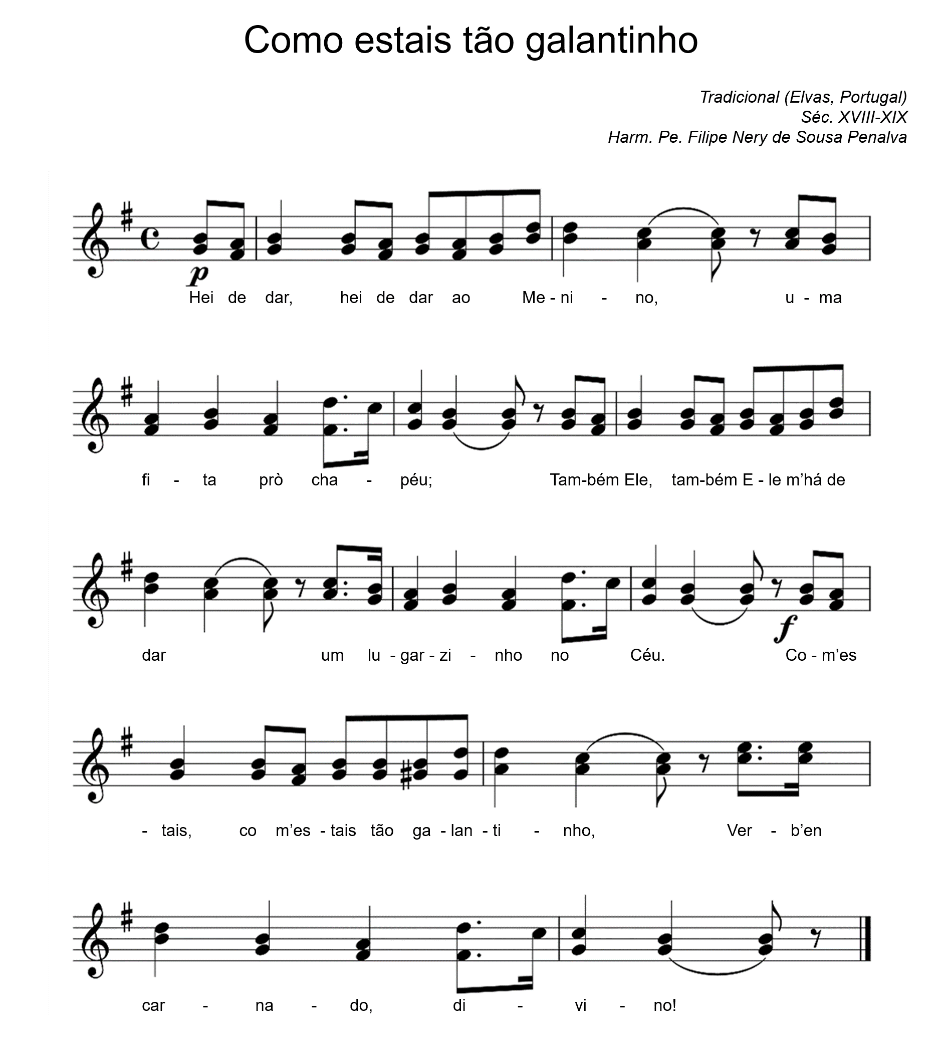 "Como estais tão galantinho", também conhecida como "Natal de Elvas" ou "Hei de dar ao Menino" é uma canção de Natal Portuguesa. Esta versão é adaptada da publicação de 1893 do Cancioneiro de músicas populares da autoria de Filipe Nery de Sousa Penalva.